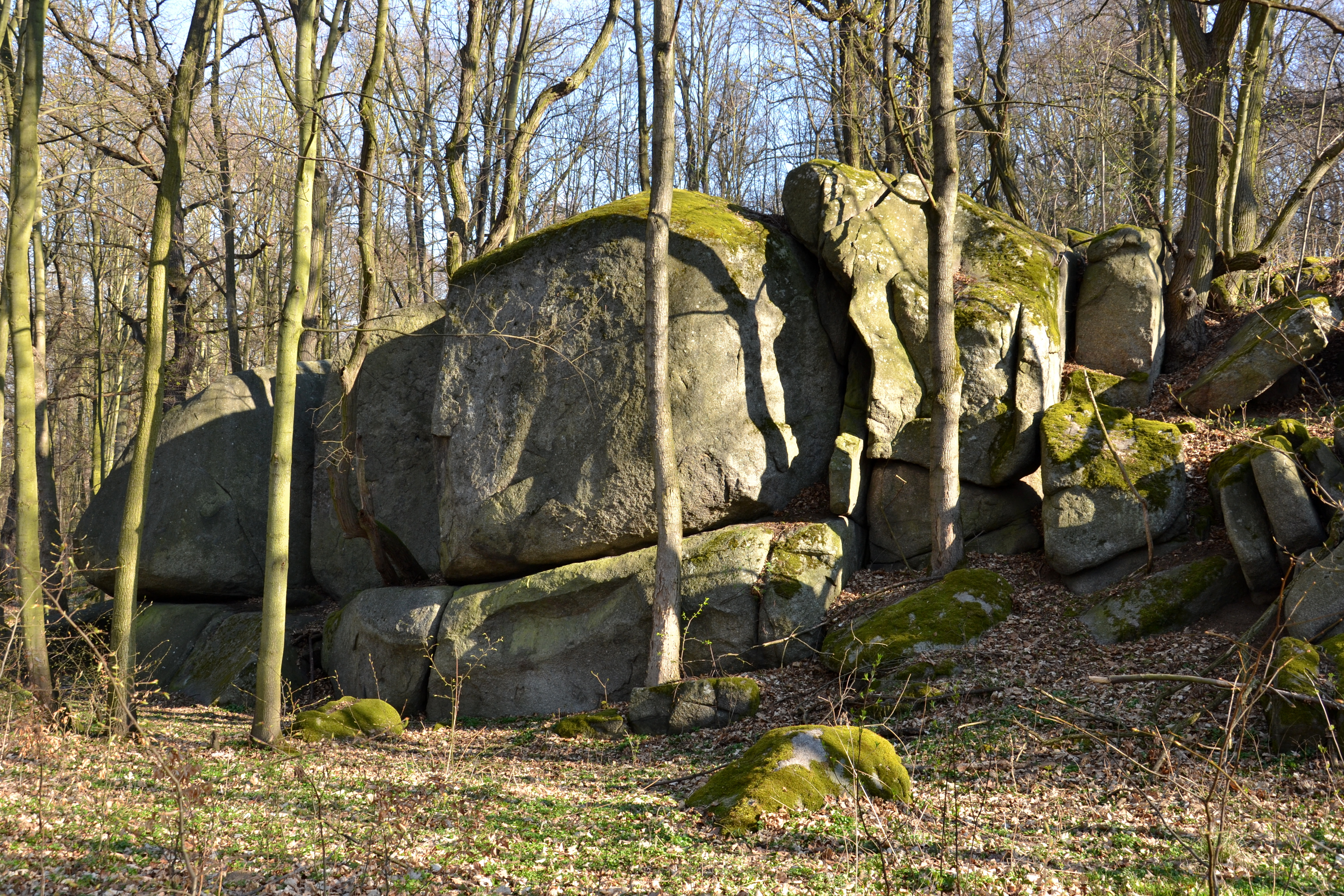 Háj Petra Bezruče – rozpad žuly